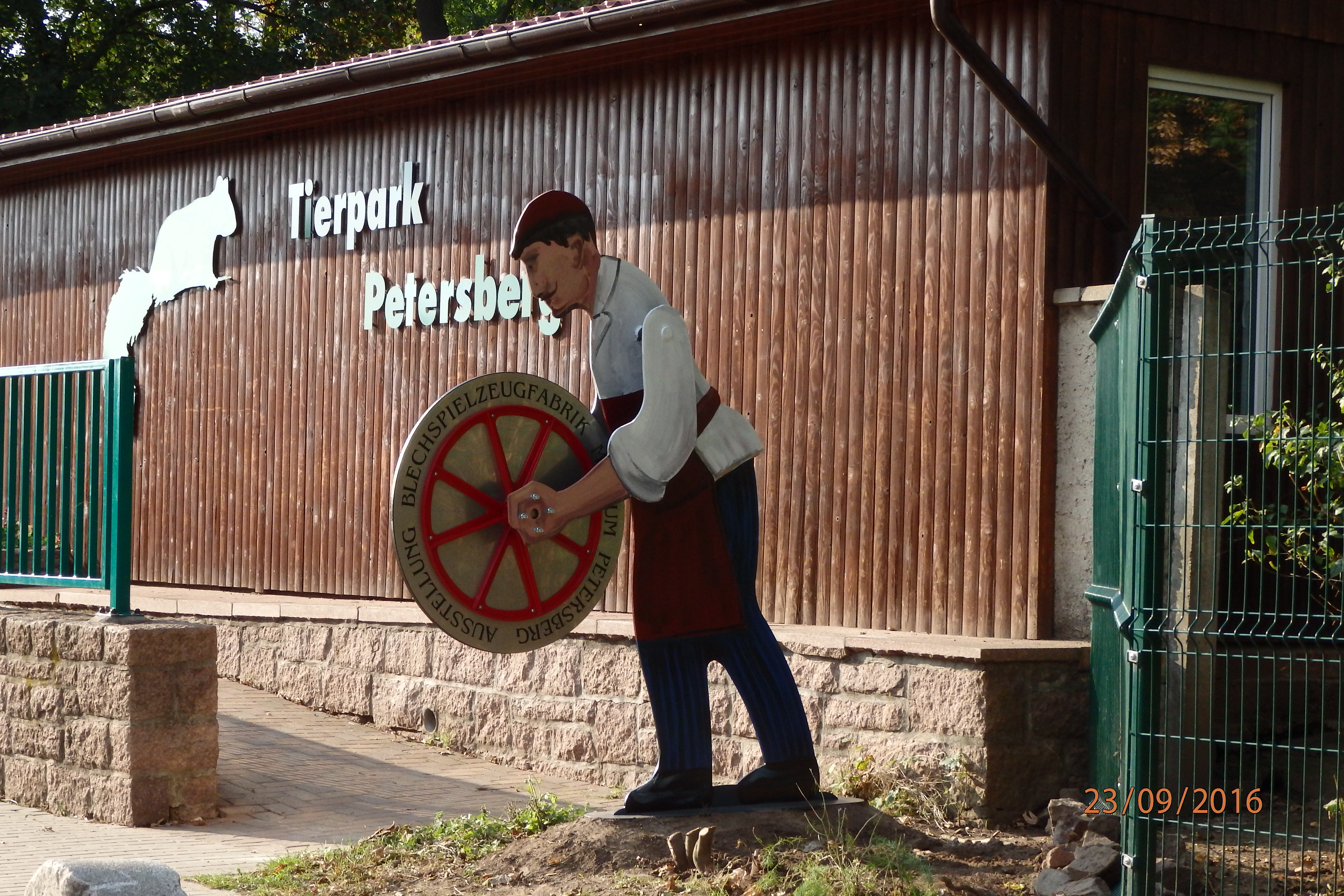 Werbung Museum Petersberg Ausstellung